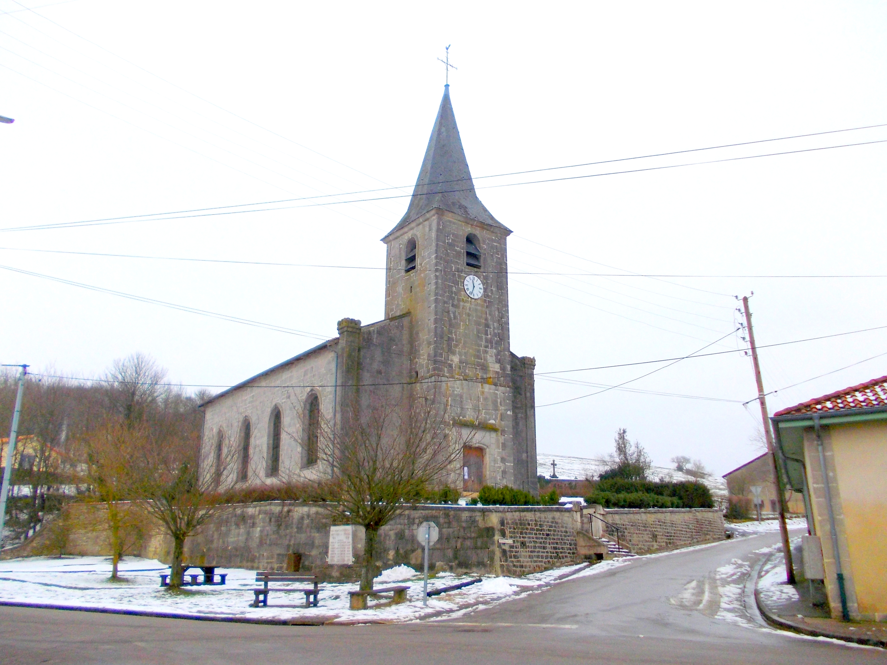 Église de la commune Chonville